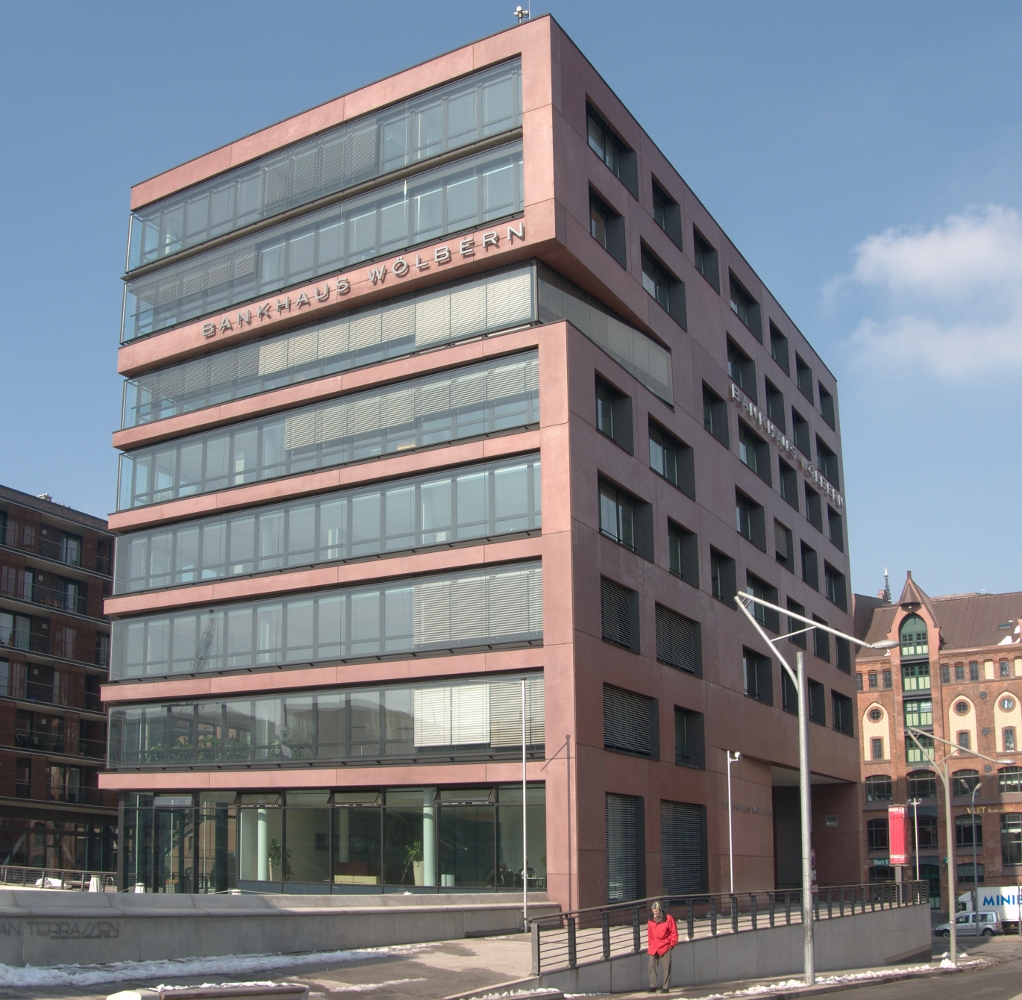 Haus Wölberbank, Hafencity, Sandtorkai 54 Architekt: Jan Störmer